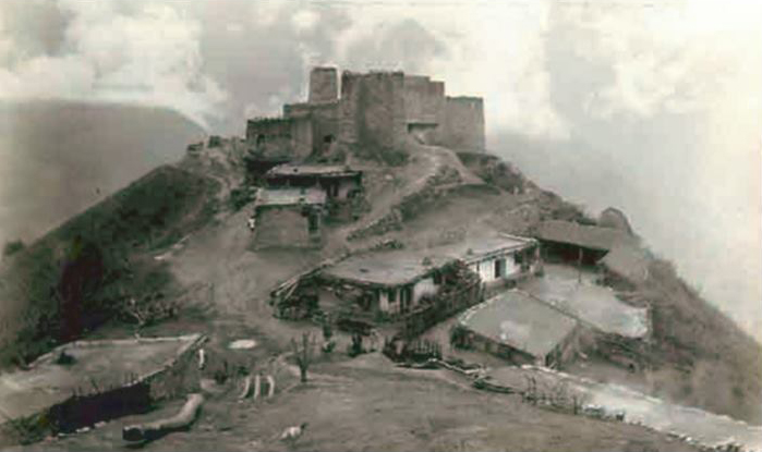 Ингушское горное селение Духаргишт. Конец XIX в.